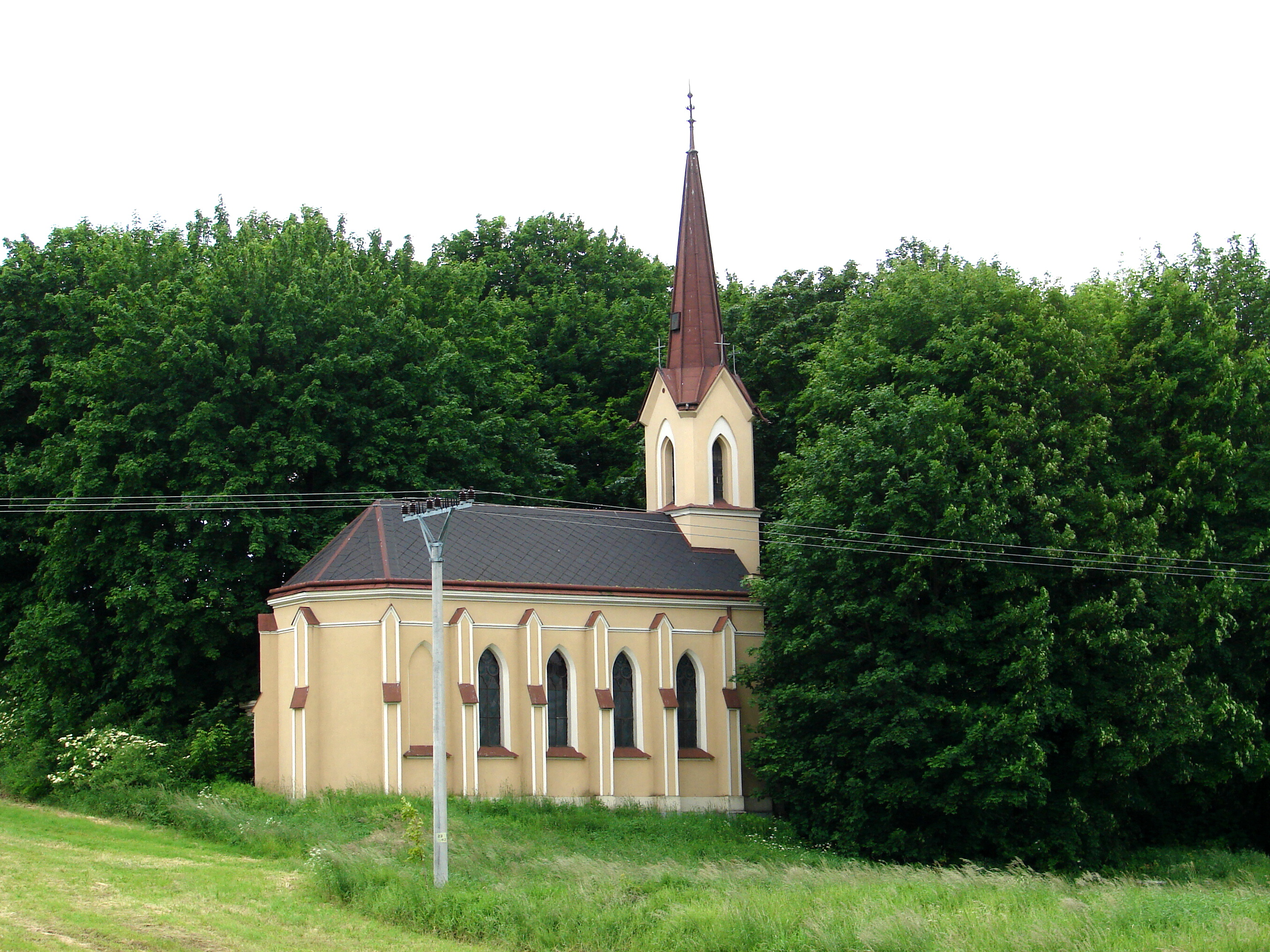 Hřitovní kaple Panny Marie, Chomýž